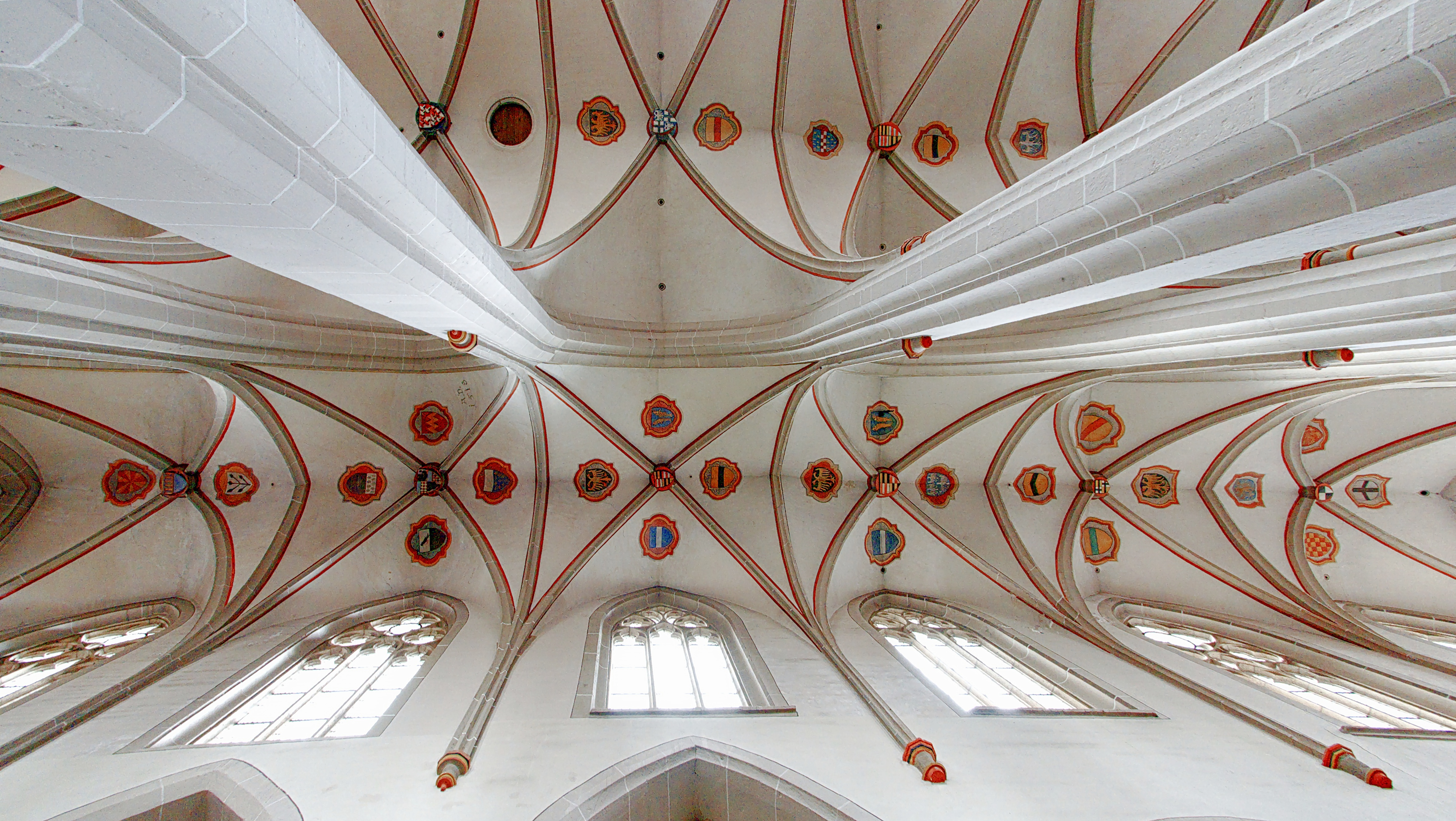 Gewölbe der Chistuskirche in Andernach